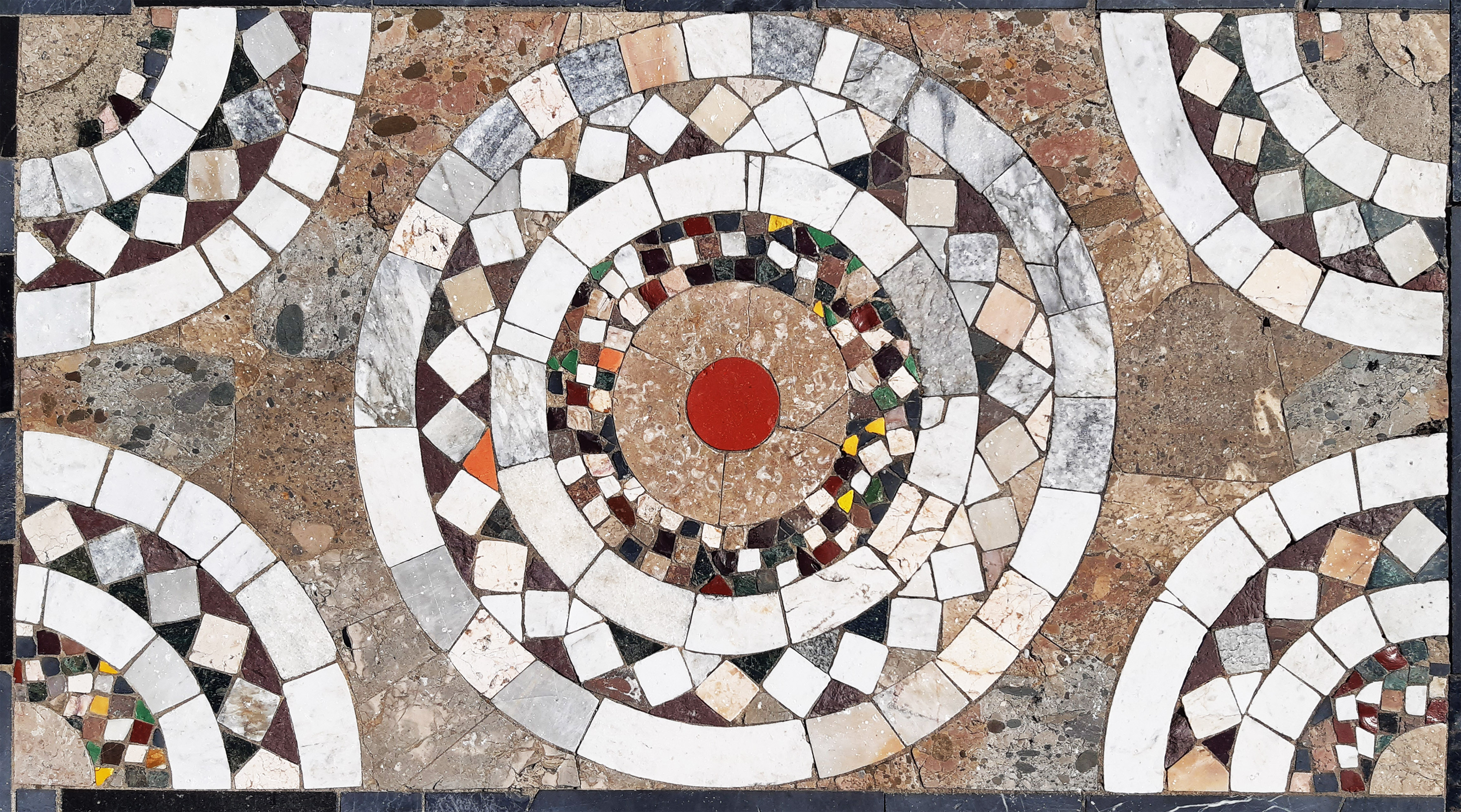 Мозаїка підлоги Десятинної церкви, Київ, Володимирська вул., 2